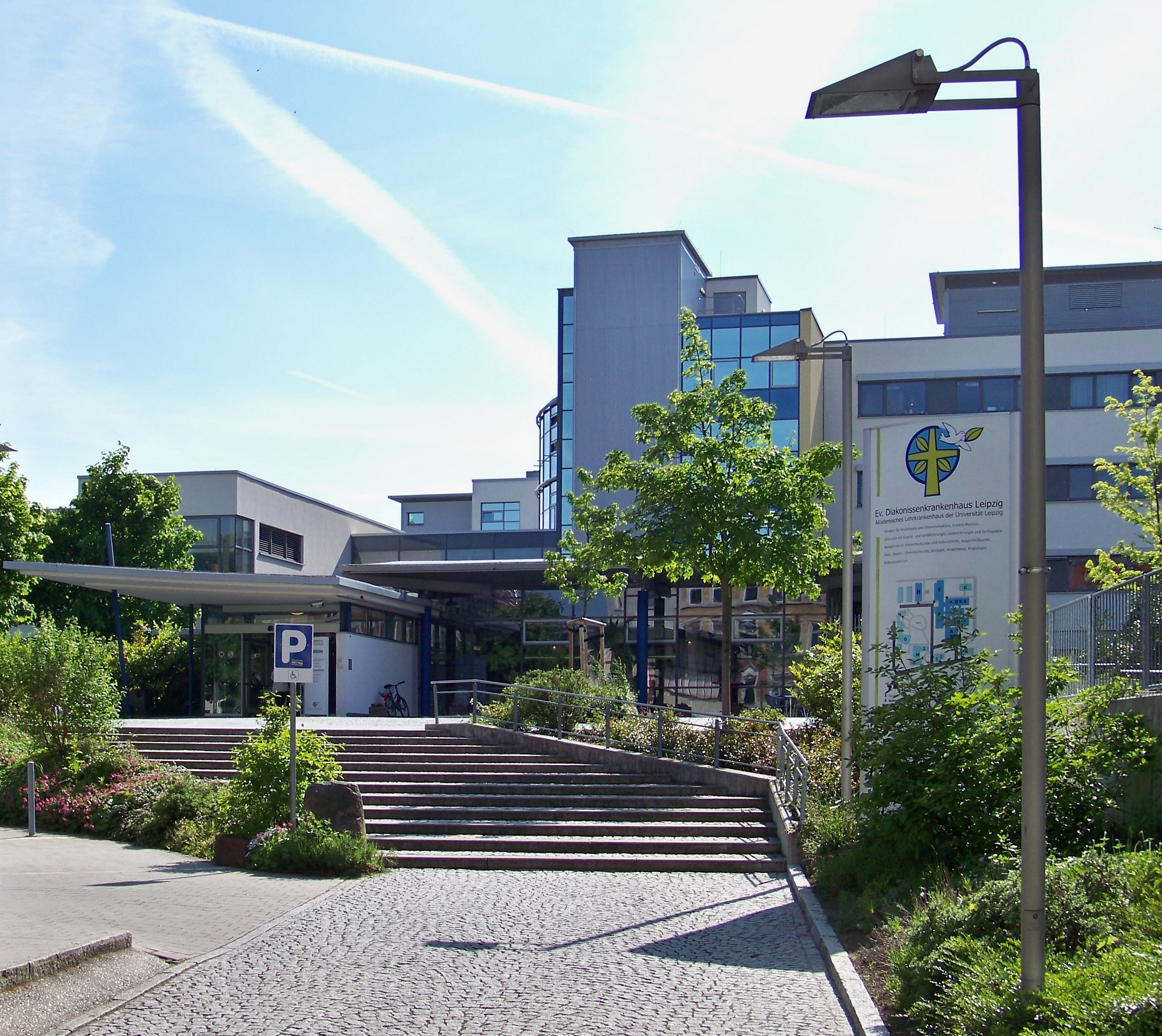 Haupteingang des Evangelischen Diakonissenkrankenhauses - Akademisches Lehrkrankenhaus der Universität Leipzig - in der Georg-Schwarz-Straße in Leipzig-Leutzsch